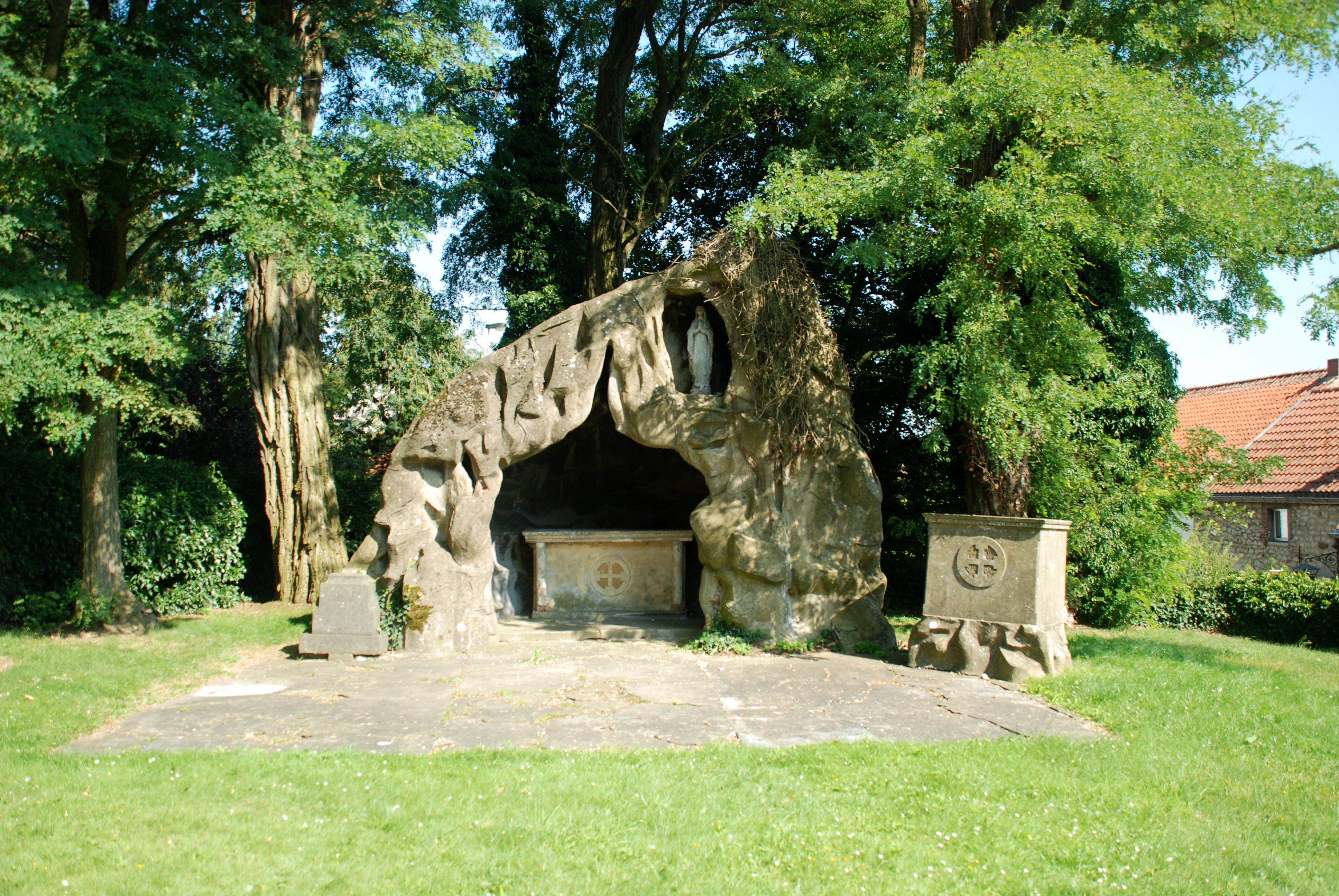 Belgique - Brabant wallon - Église Saint-Pierre de Glabais